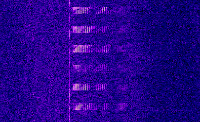 Frequenztöne. Darstellung einer typischen ‚Sendung‘ von UVB-76 durch einen Spektrumanalysator.